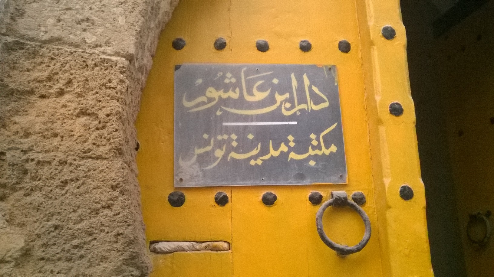 Rue du Pacha , la médina de Tunis